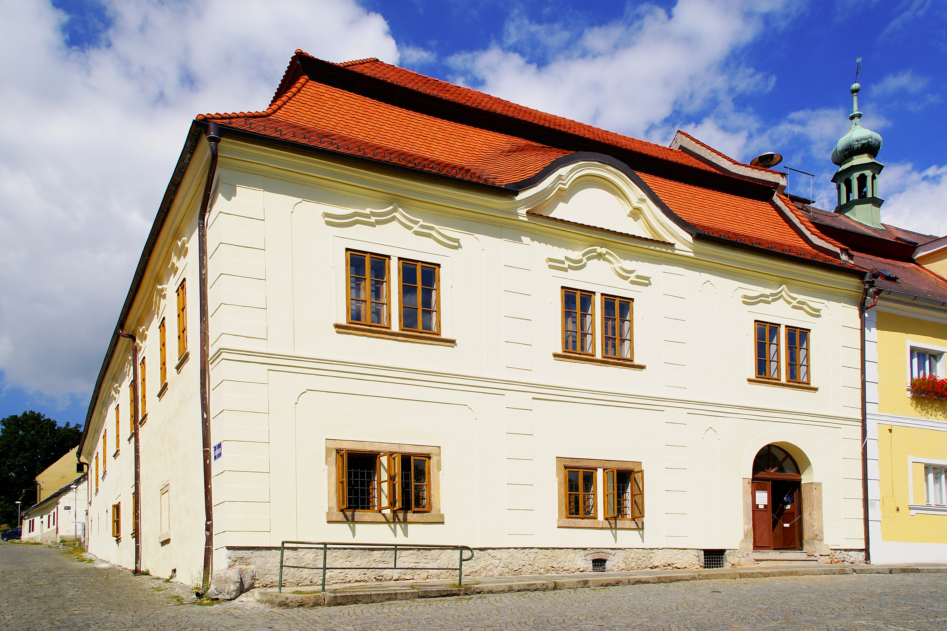 Barokní měšťanský dům na Velkém náměstí ve Žluticích dnes slouží jako muzeum.